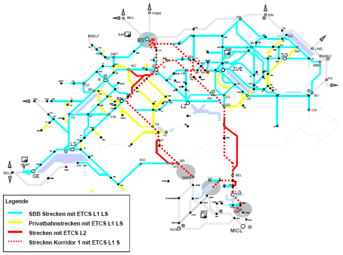 Im Schweizer Eisenbahn-Normalspurnetz muss zum Fahrplanwechsel m Dezember 2017 ETCS in Betrieb genommen werden.